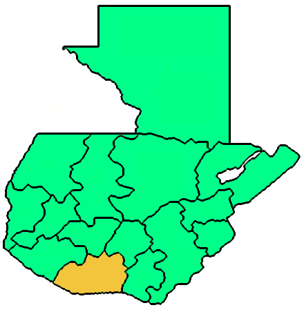 Mappa della diocesi cattolica di Escuintla, in Guatemala. Lavoro personale eseguito a partire da questa immagine di Commons. Fonte per i confini delle diocesi